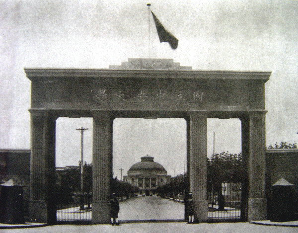 国立中央大学南门与大礼堂